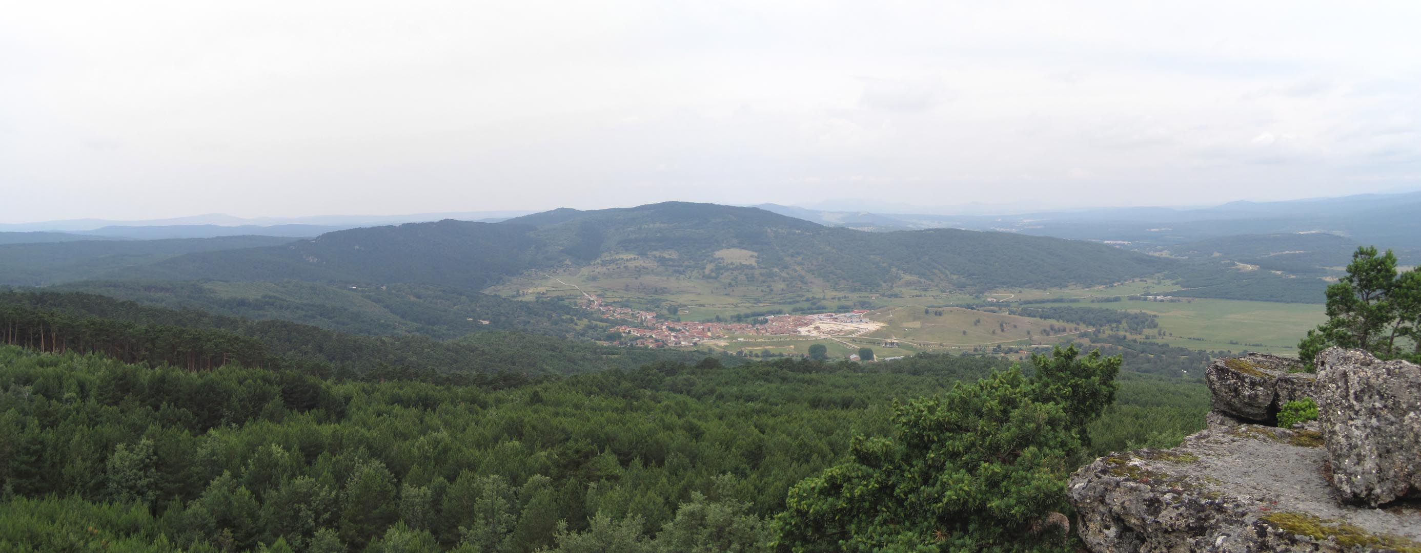 Vista panorámica de Canicosa de la Sierra (Burgos, España).